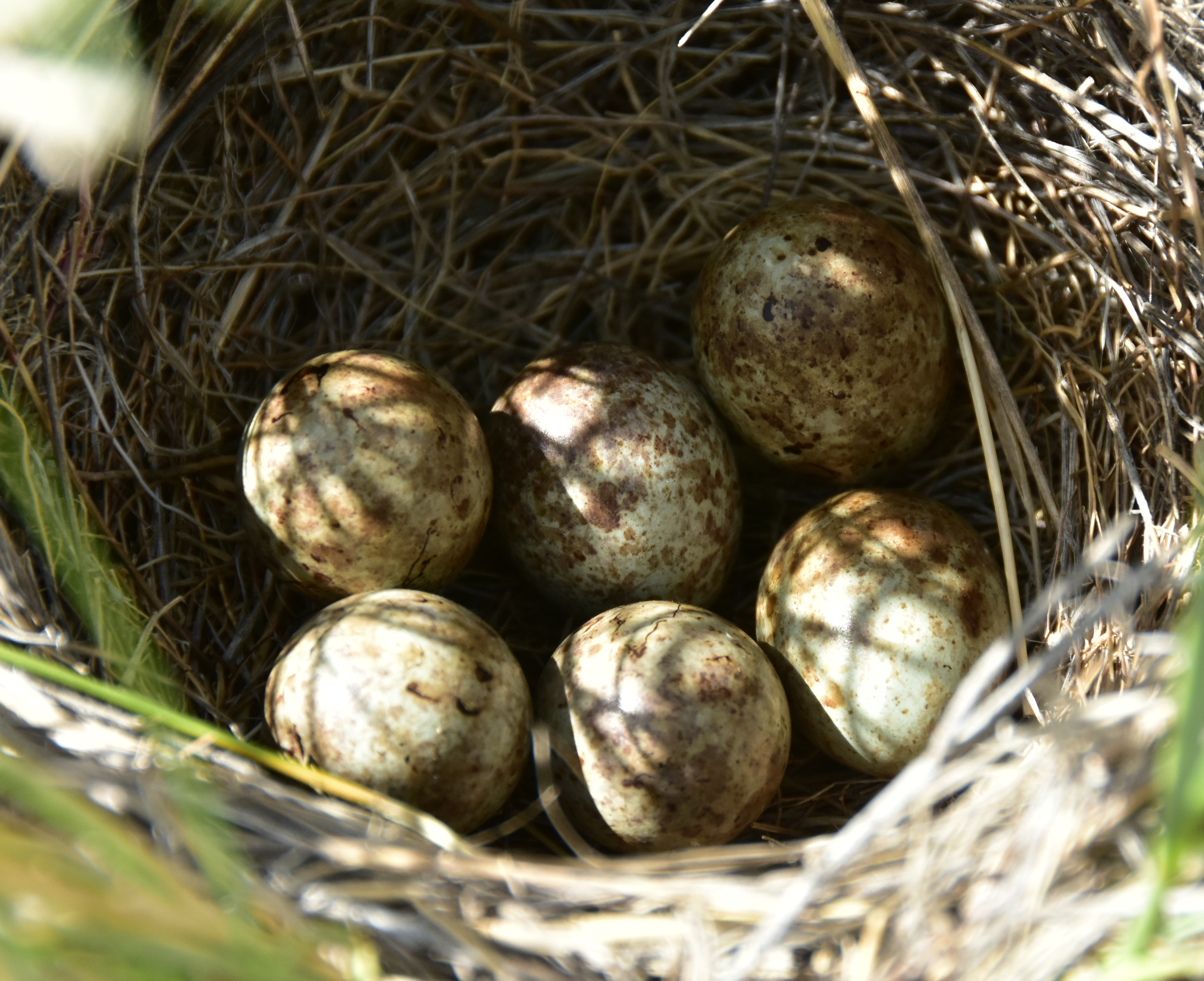 Photo: Tom Koerner/USFWS